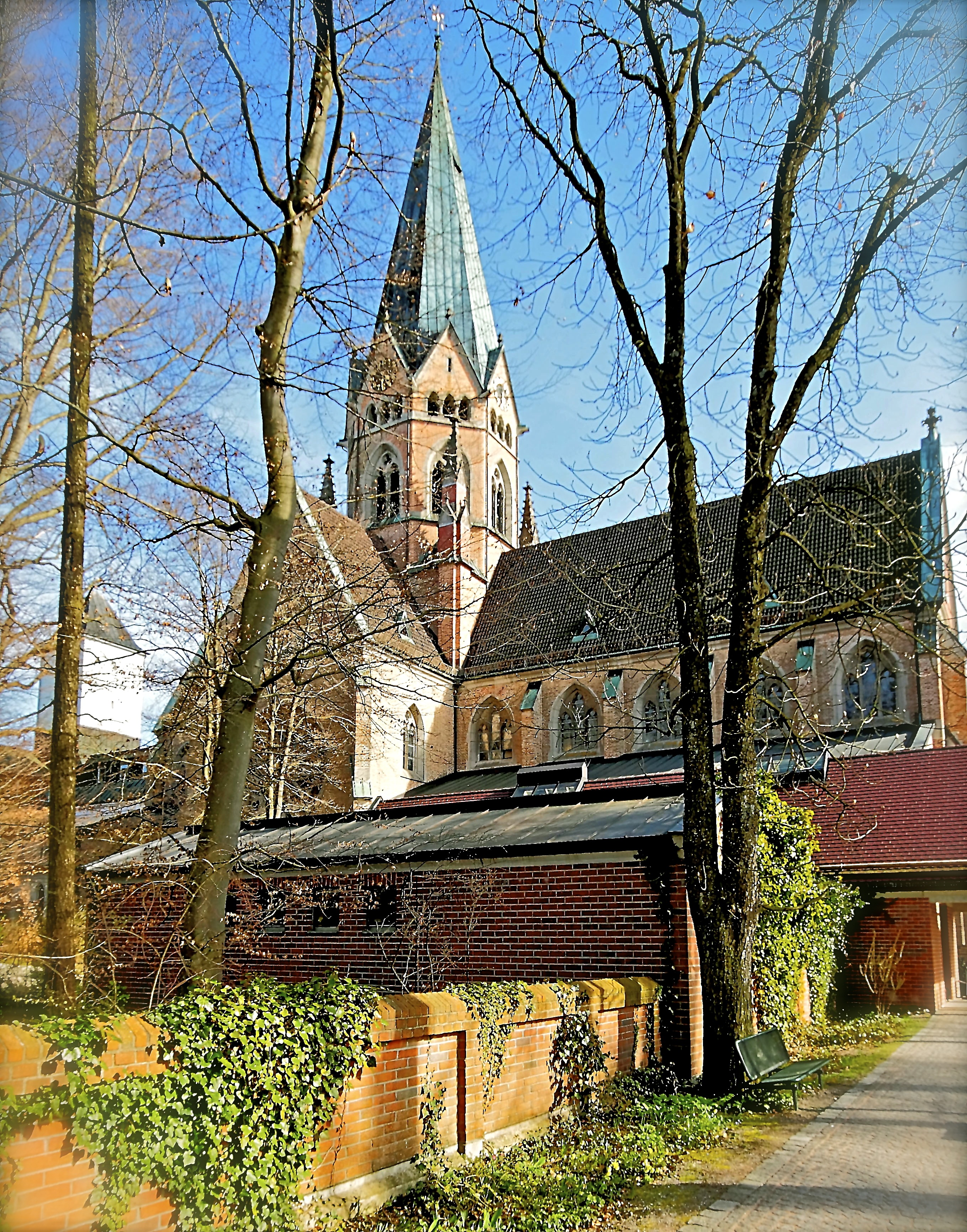 Nach einer Tagestour vom Ammersee her kommend ein gelungener Ausklang...